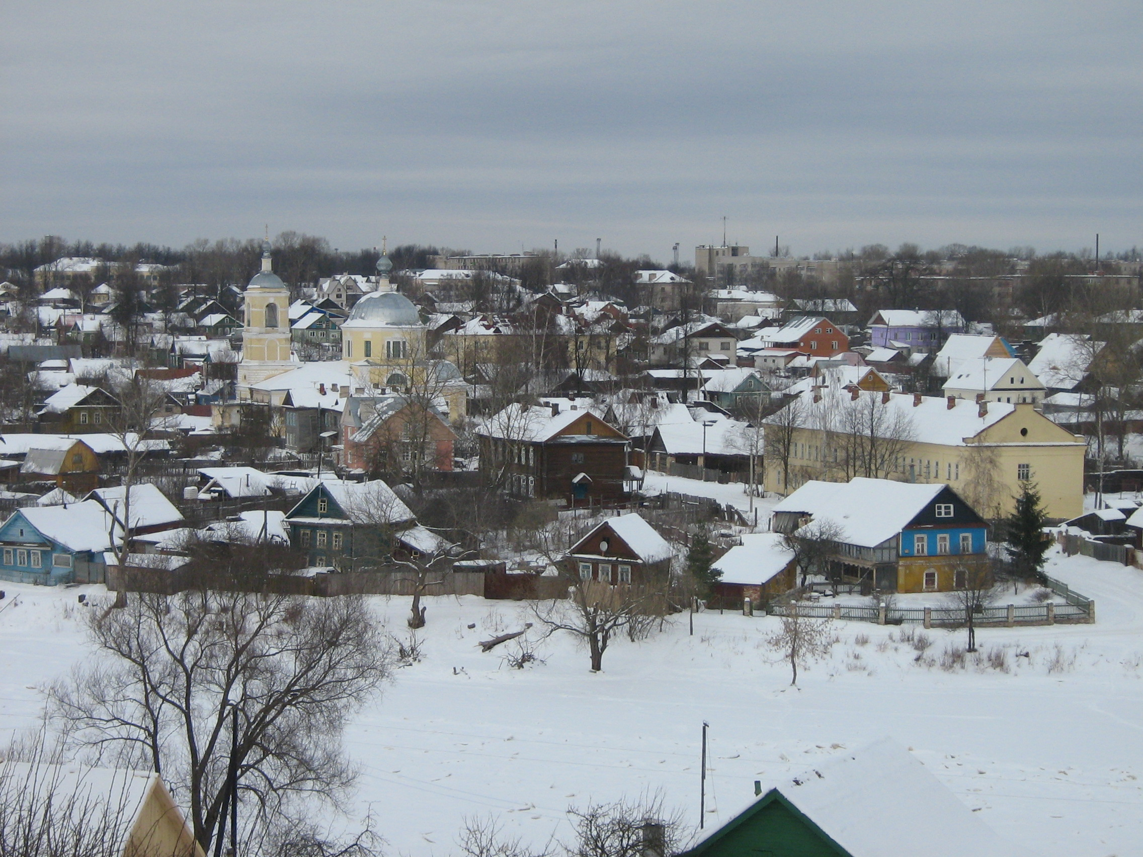 Торжок. Старая часть города. 17.02.2007